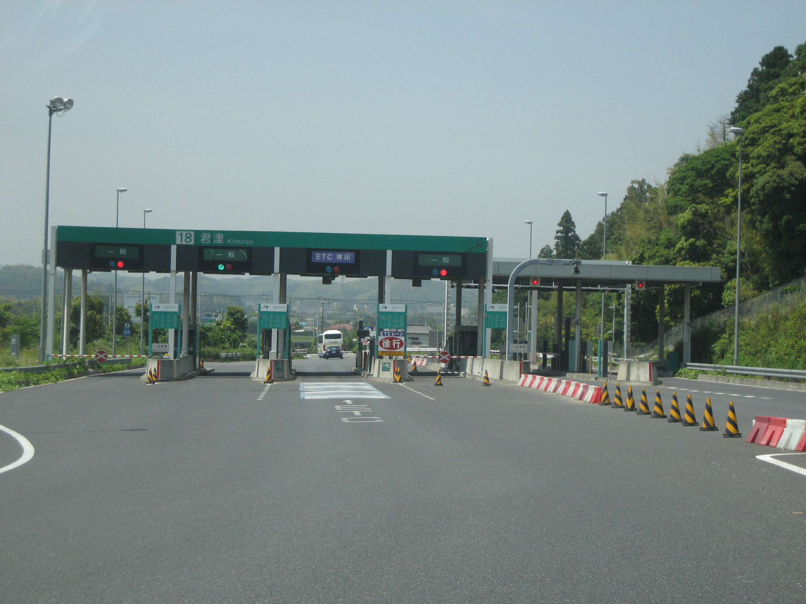 館山自動車道君津IC料金所